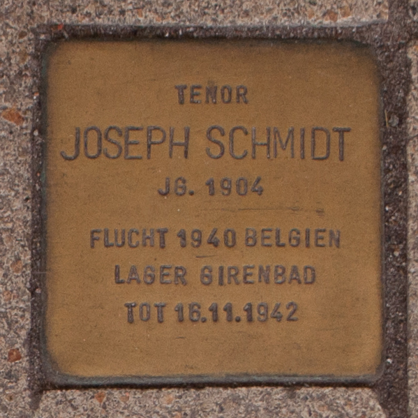 Stolperstein für Joseph Schmidt vor der Hamburgischen Staatsoper in Hamburg-Neustadt.